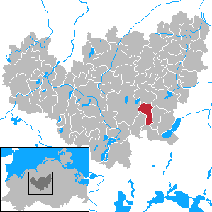 Groß Wokern in Mecklenburg-Vorpommern - District Güstrow